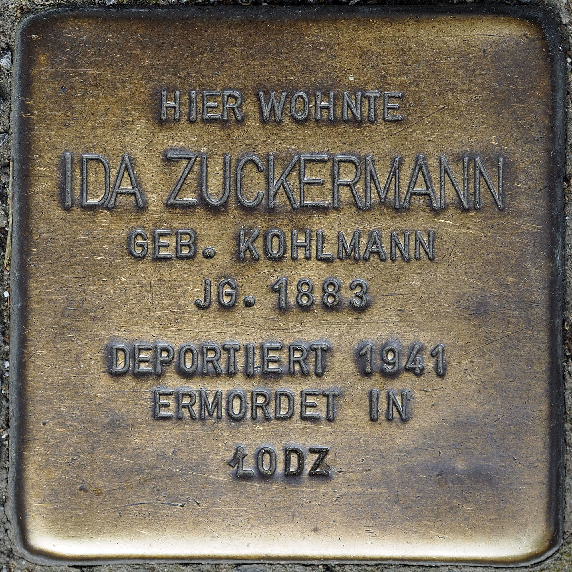 Stolpersteine MG: Zuckermann, Ida